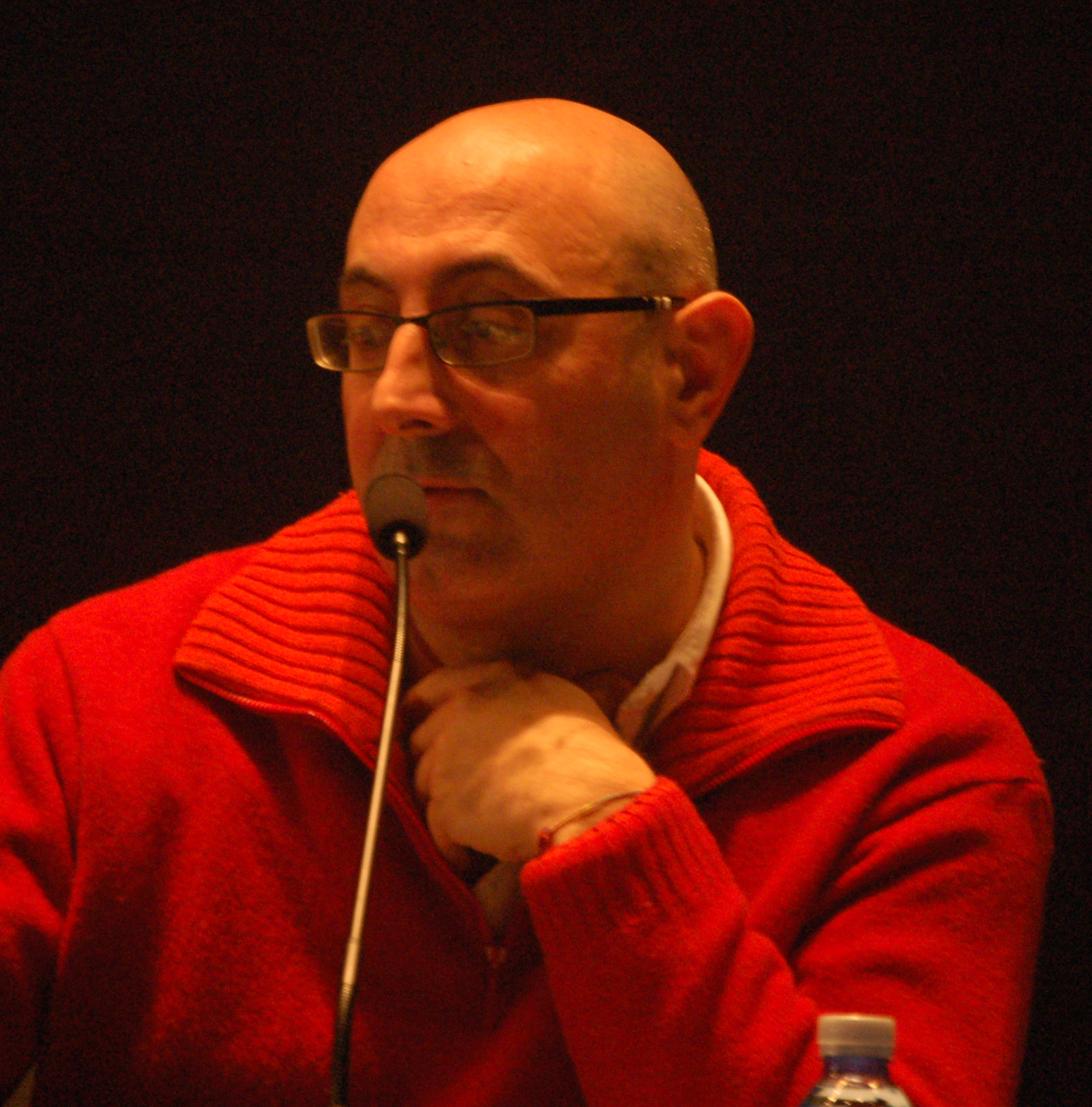 Antón Baamonde no I Simposio Ecolingua